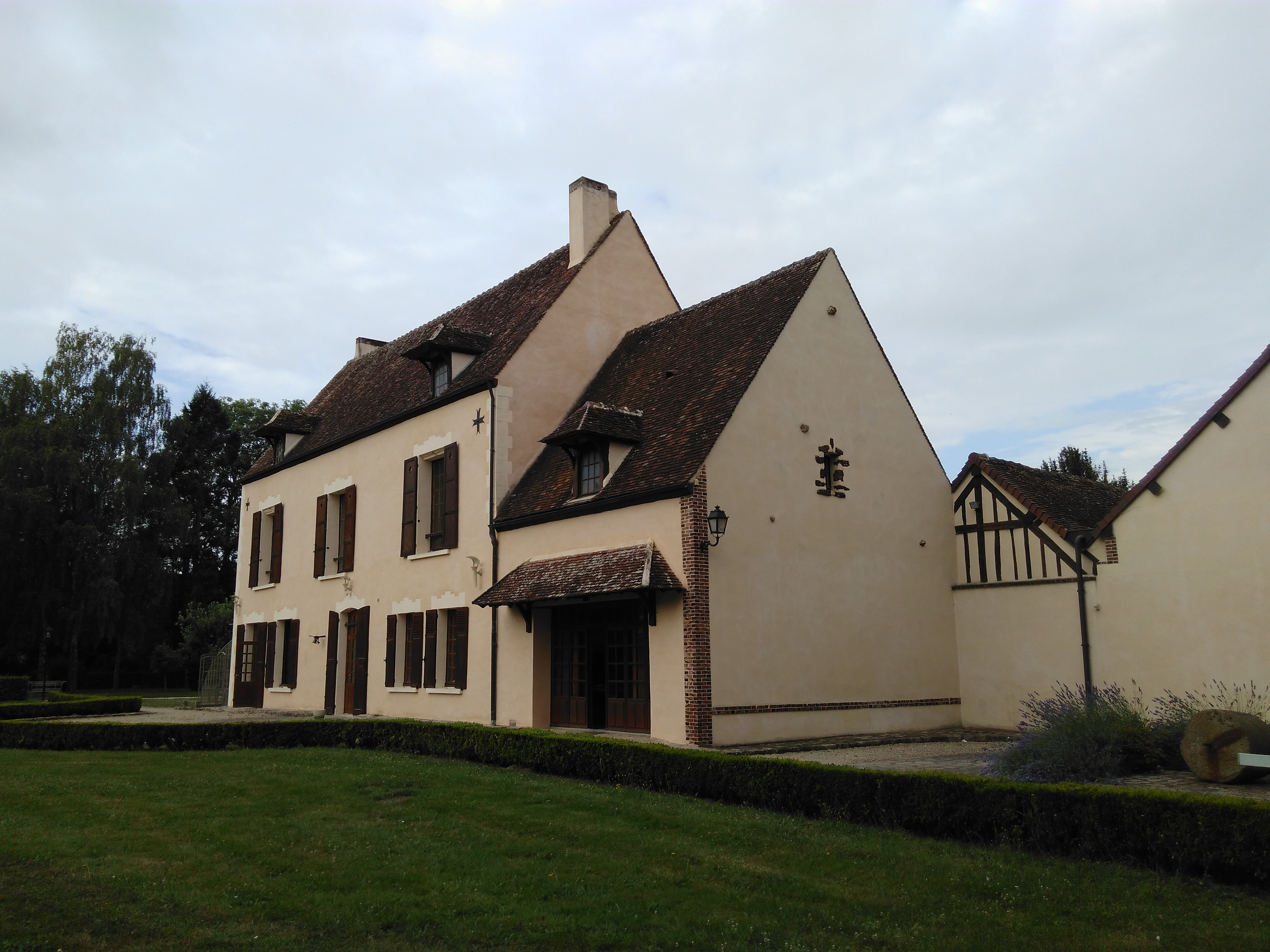 Mairie de Chuisnes, ancien prieuré